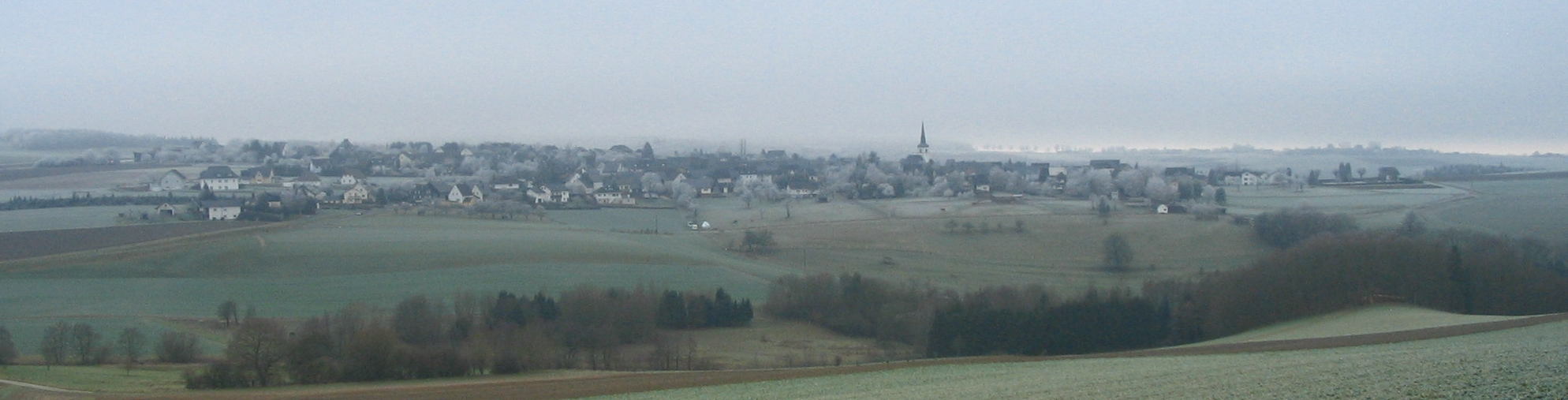 Lötzbeuren im Hunsrück aus Richtung Osten